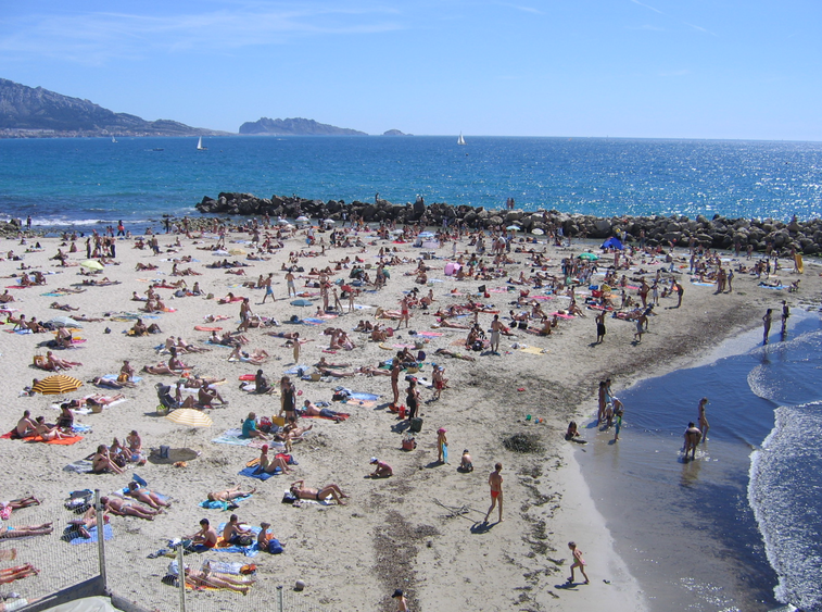 Plage de Marseille peuplée, en Mai 2007